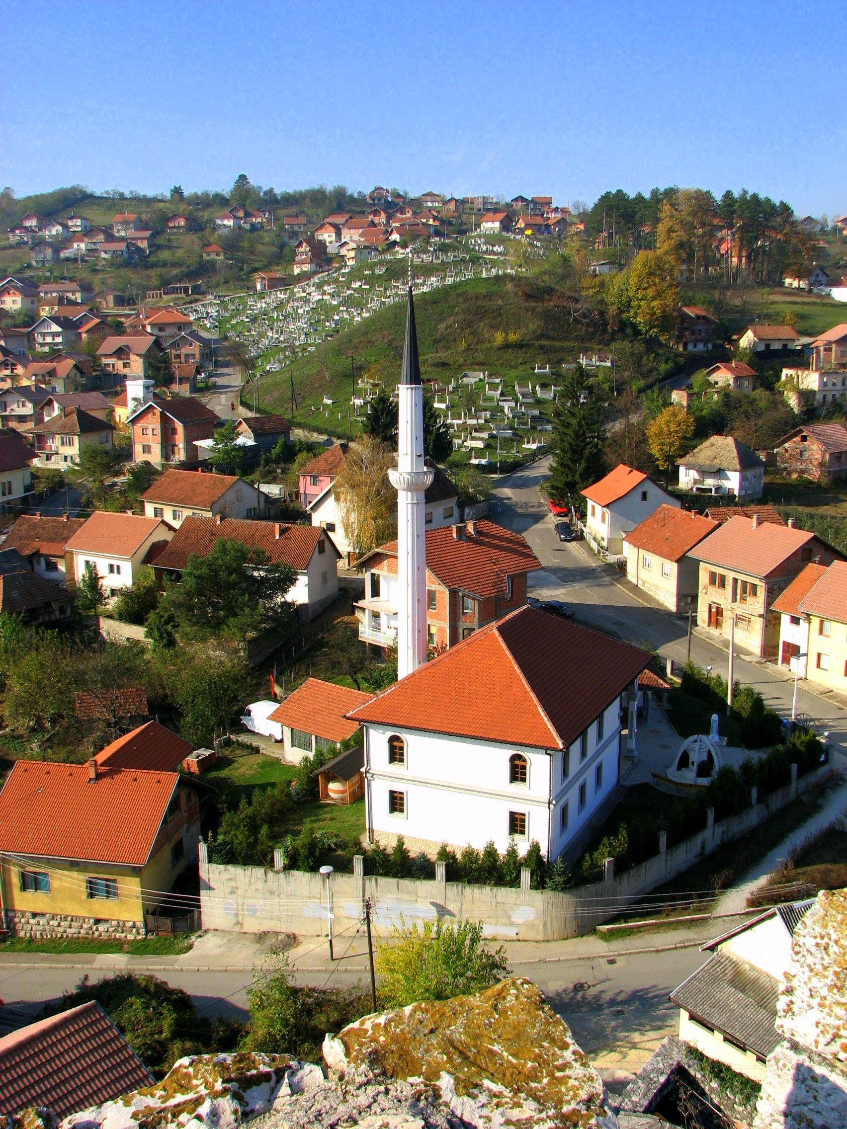 Џамија Селимија (Чаршија). Аутор: Бранко Д. Тодоровић